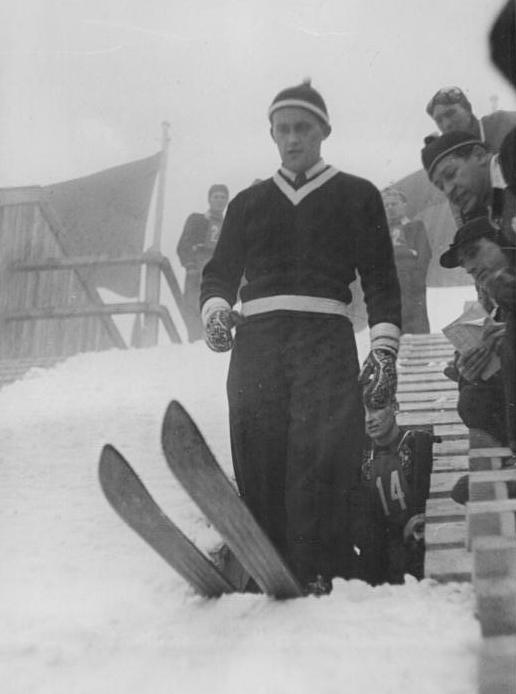 1. Wintersportmeisterschaften der DDR v. 28.2. bis 4.3.1950 in Schierke UBz: Zwei der sowjetischen Sportler beteiligen sich am Spezialsprunglauf. Skeworzow vor der Abfahrt. Aufn.: Illus-Quaschinsky 5664-50 3 str